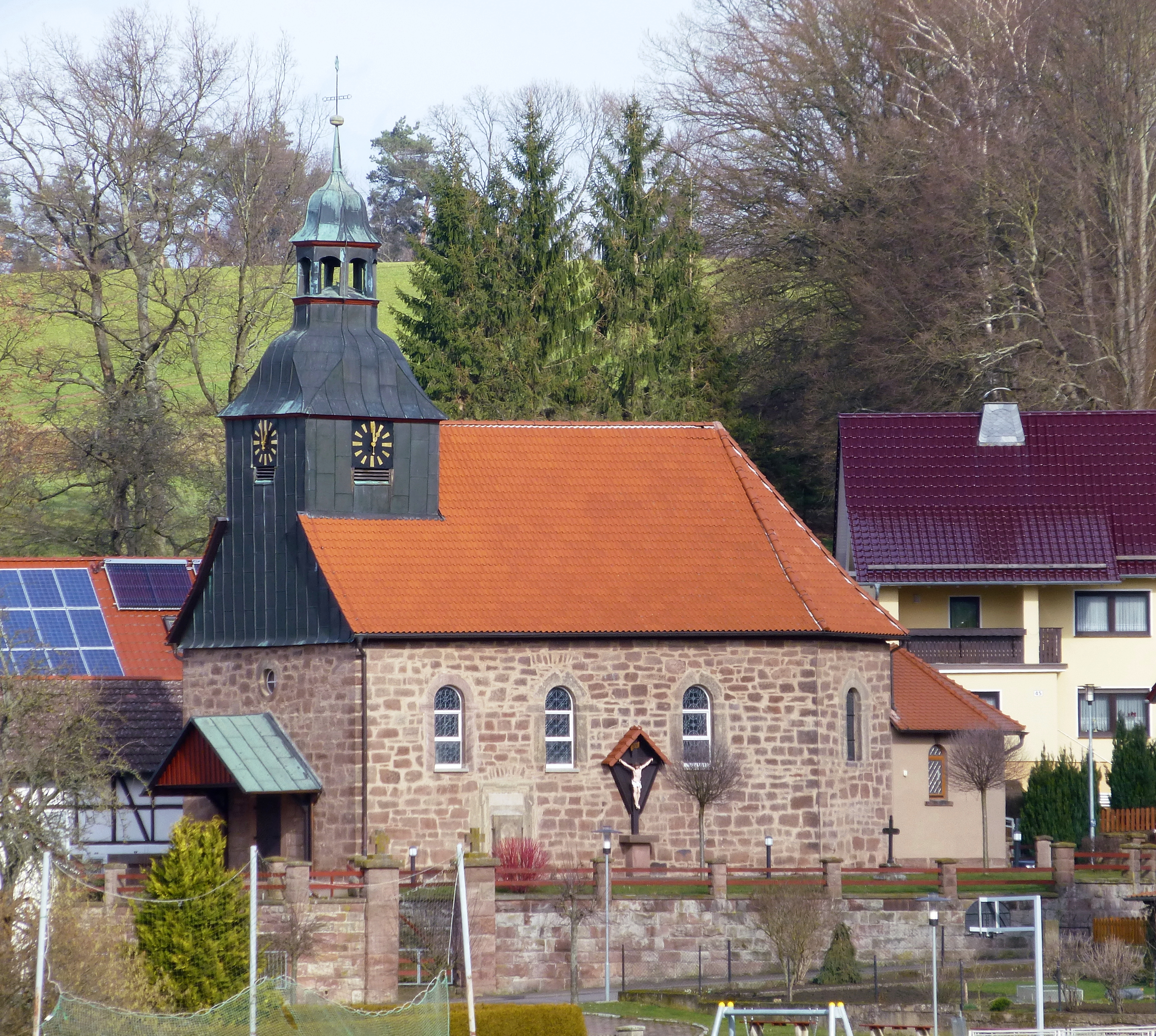 Schachtebich, kath. Kirche St. Magnus